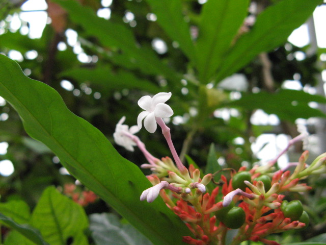 Rauvolfia serpentina (spelling!)